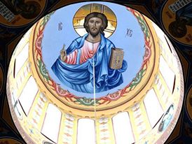 Успенский собор Астаны фото6